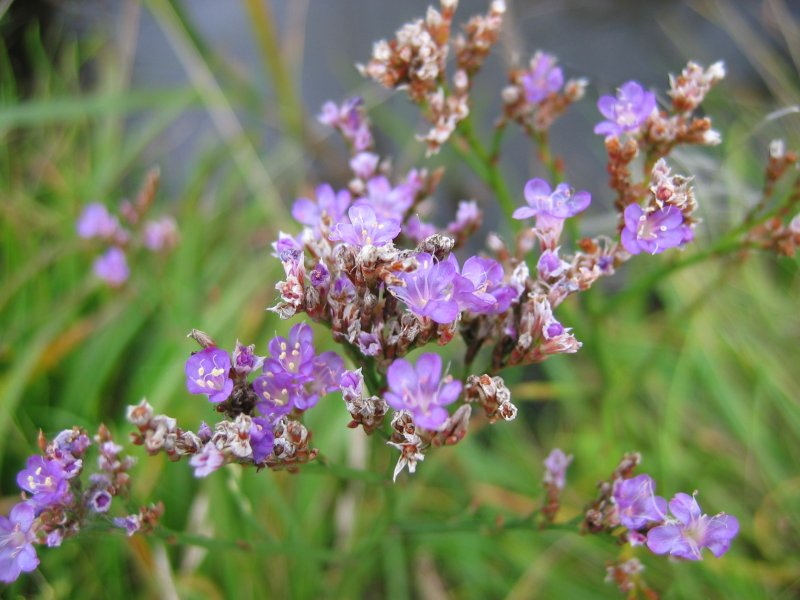 Gewöhnlicher Strandflieder Limonium vulgare, Wismarbucht